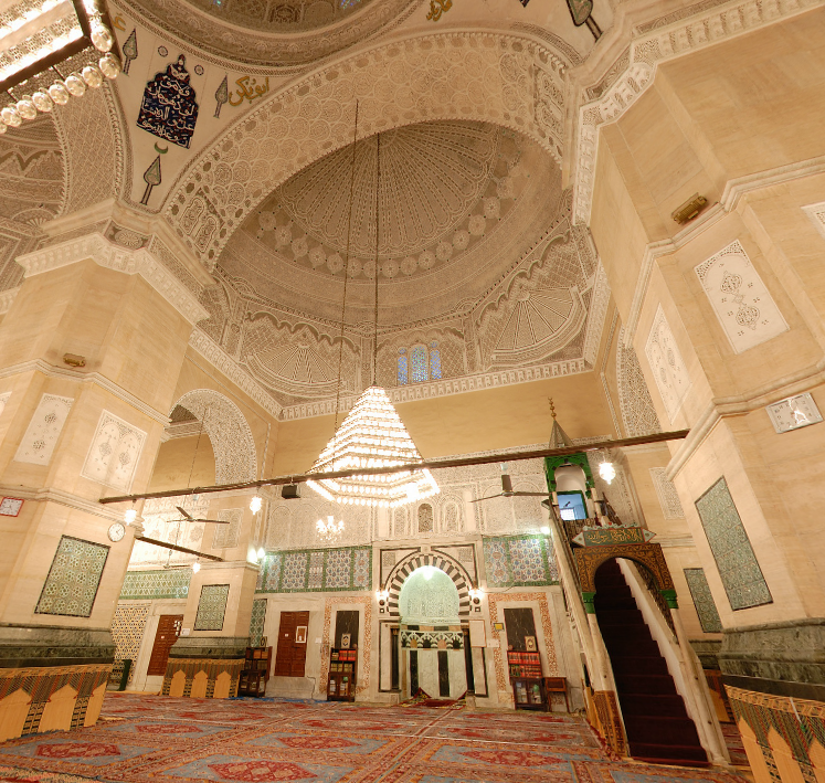 Mihrab (niche qui indique la direction de La Mecque) de la mosquée M'hamed Bey Mouradi à Tunis, Tunisie, aussi appelée mosquée Sidi Mehrez, construite en 1697